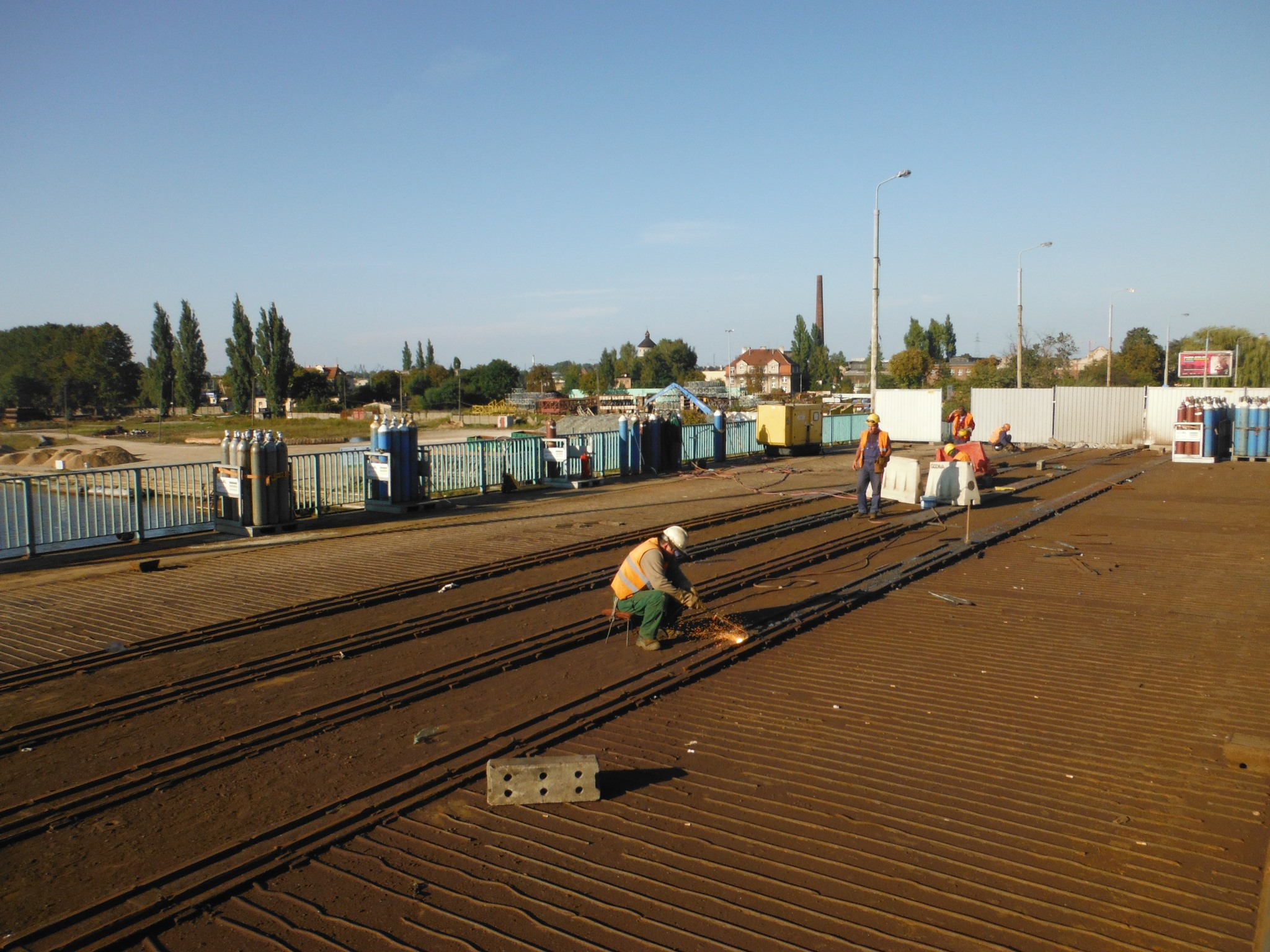 Most Siennicki w Gdańsku podczas przebudowy (stan z 17 września 2014).